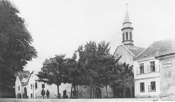 Pfarrplatz in Heiligenstadt